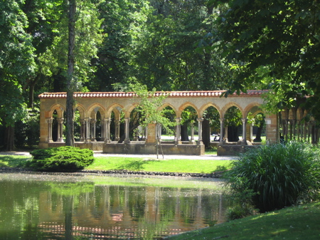 Auteur: Utilisateur:Leland sous GFDL, 2004.